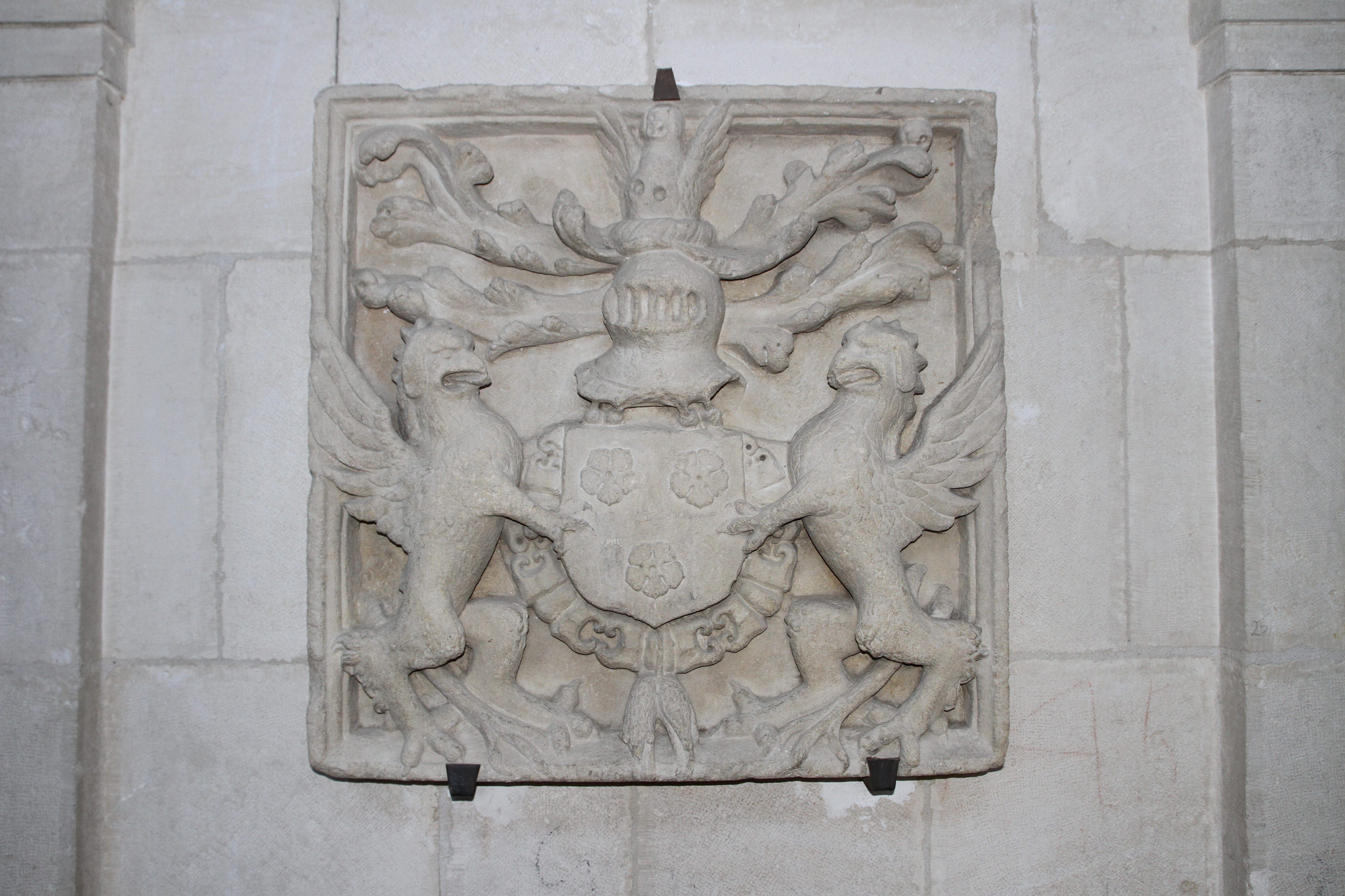 Armoiries appartenant à la famille de Vergy. Les Vergy sont les seigneurs de Champlitte 1228 à 1630. C'est une sculpture en pierre elle est placée dans la galerie du château sur la droite de l'escalier d'honneur.